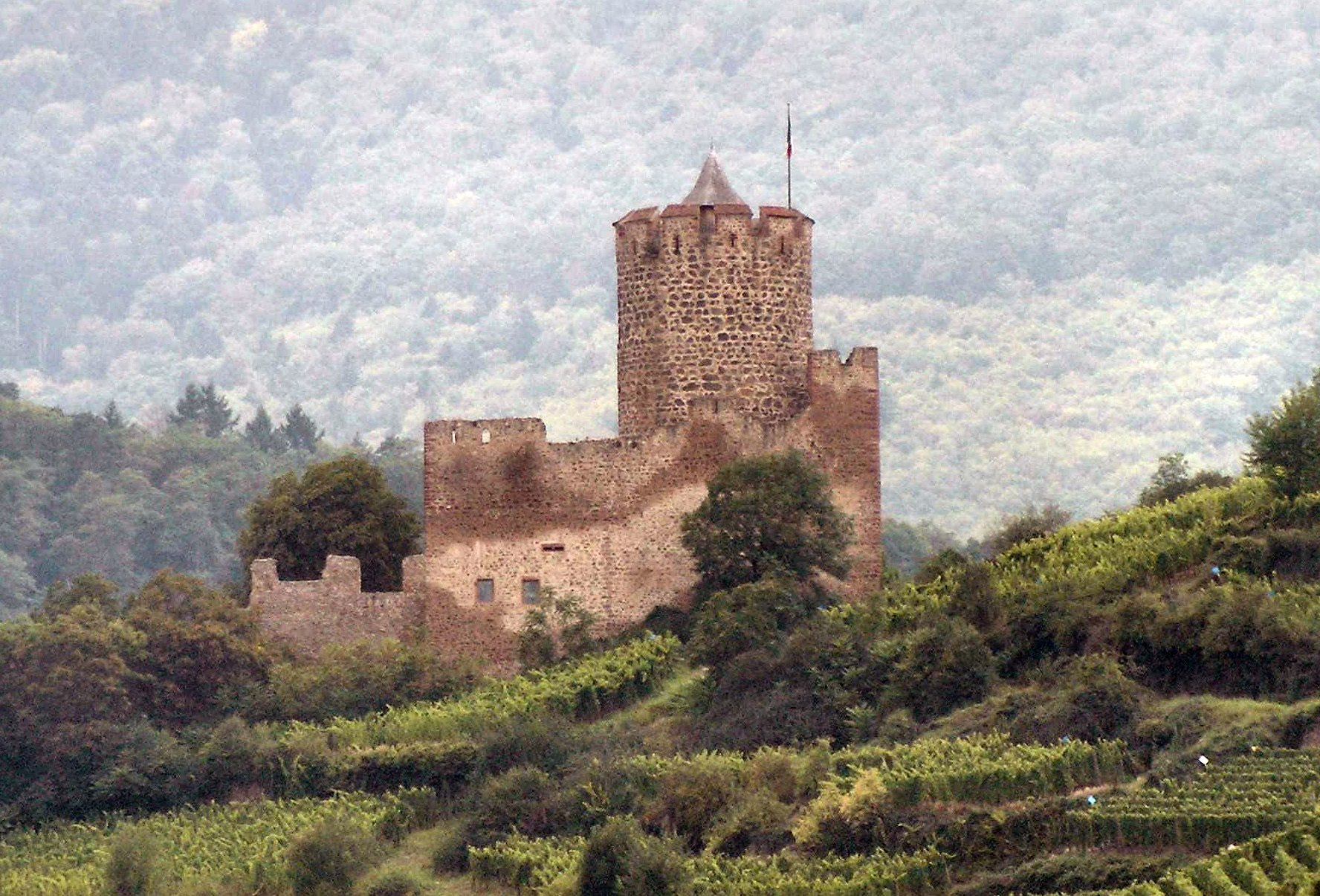 Château de Kaysersberg (290 m) (Haut-Rhin, France) This building is en partie classé, en partie inscrit au titre des Monuments Historiques. It is indexed in the Base Mérimée, a database of architectural heritage maintained by the French Ministry of Culture, under the references PA00085474 and IA68000579 .